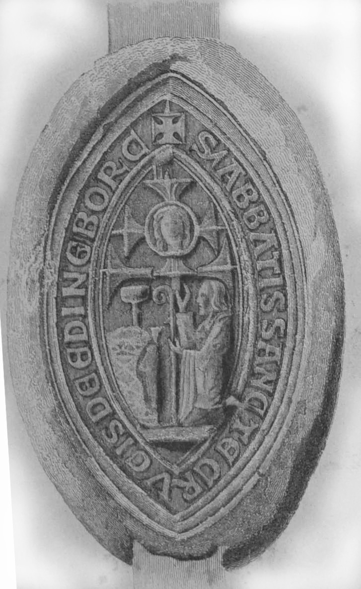 vue de Sceau de Adam abbé de Holyrood en 1291.